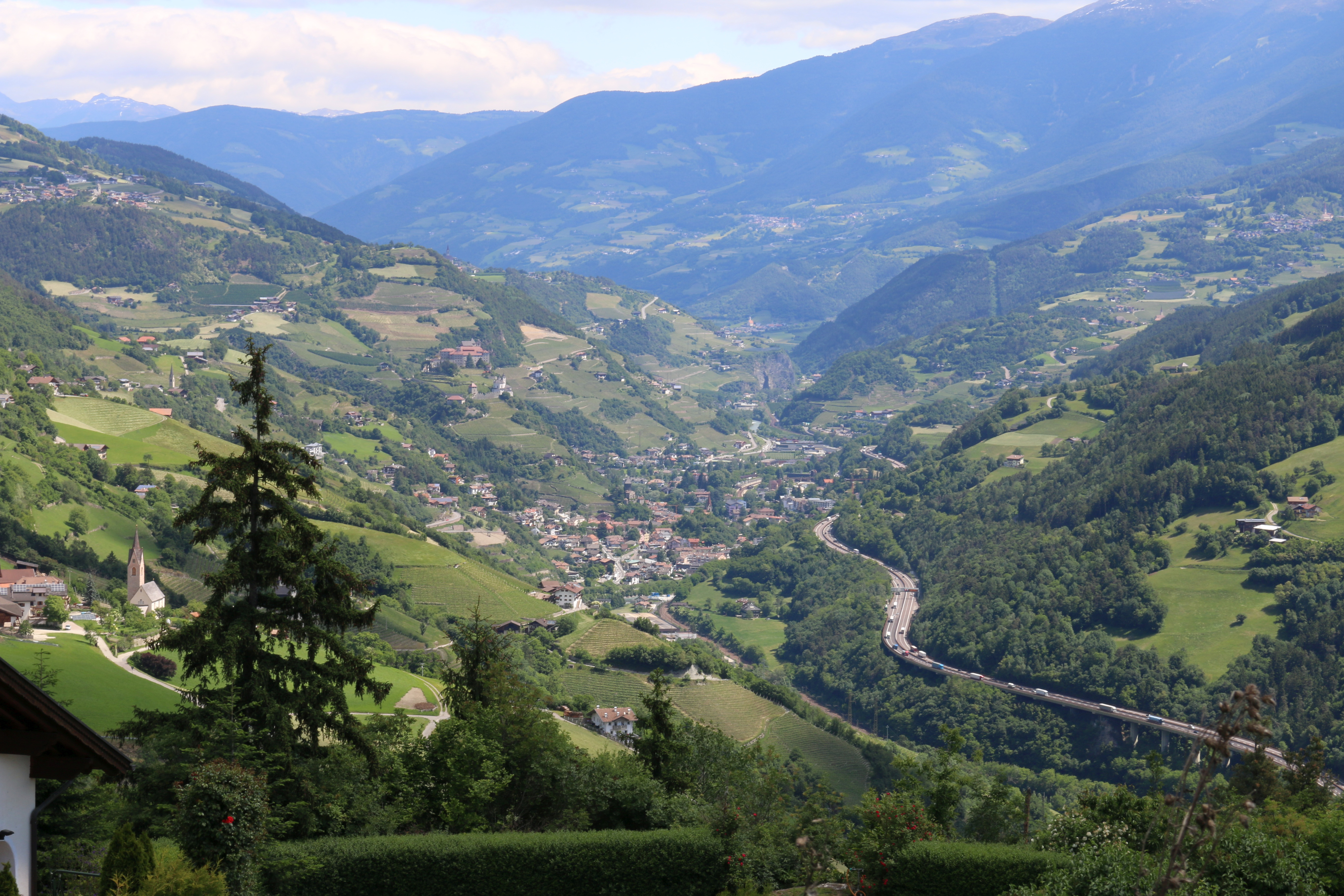 Barbian, Südtirol: Blick nach Klausen ins Eisacktal